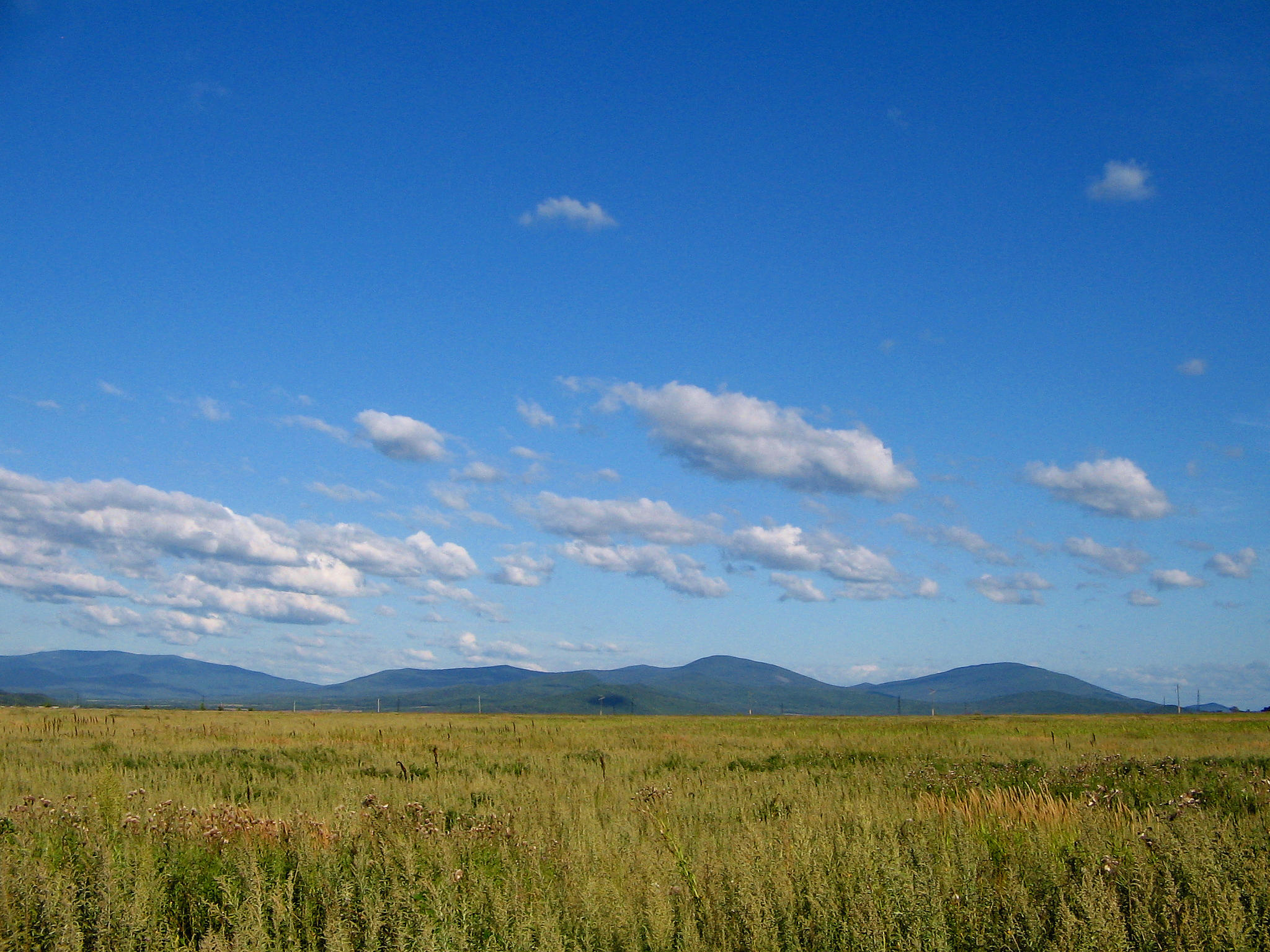 Облака от Синегорья